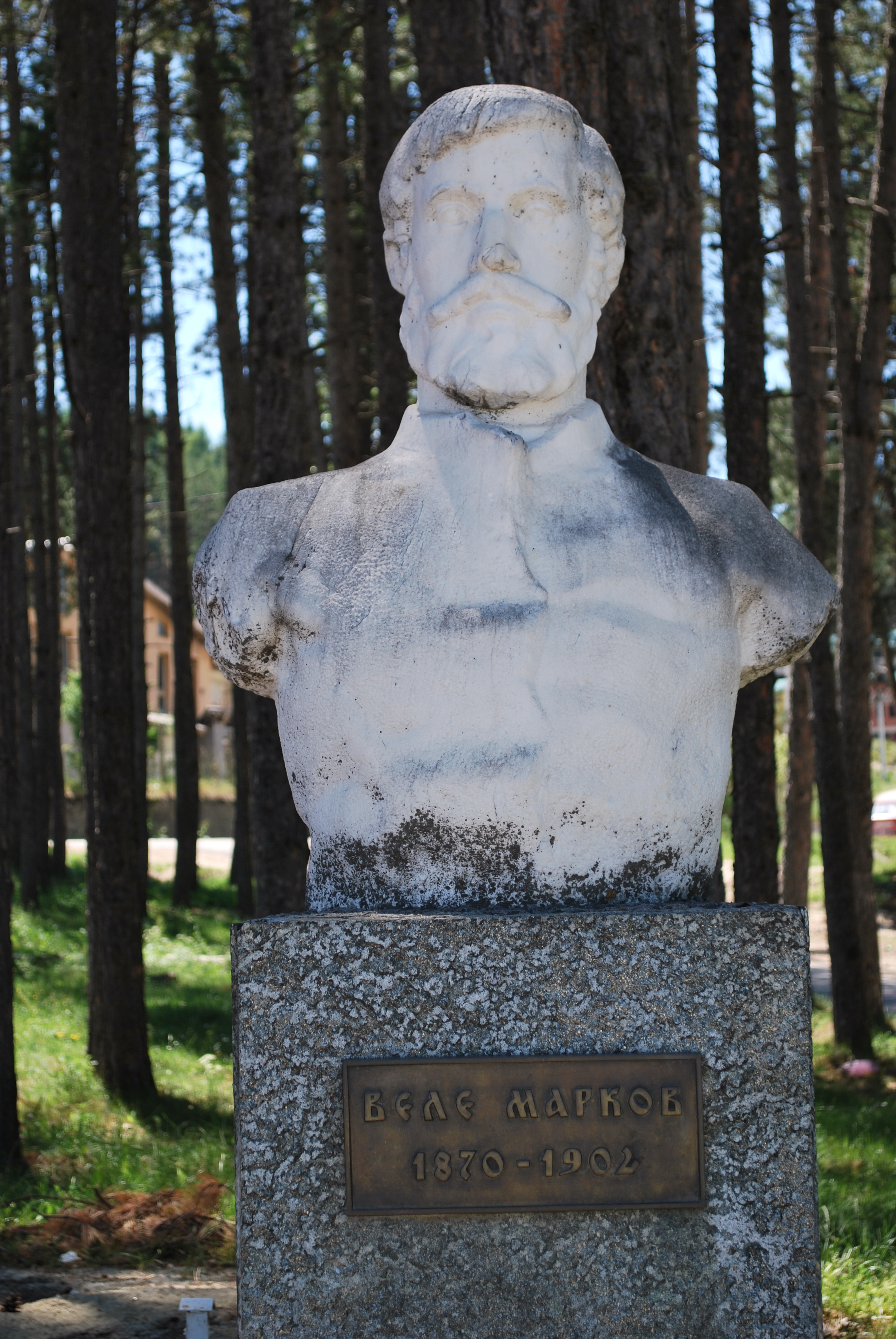 Vele Markov monument in Kruševo, Macedonia